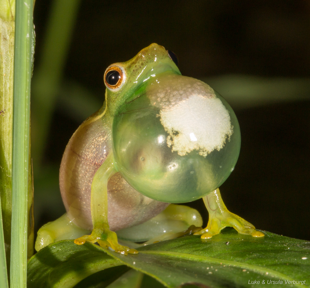 Hyperolius acuticeps Seldomseen, Vumba, Zimbabwe